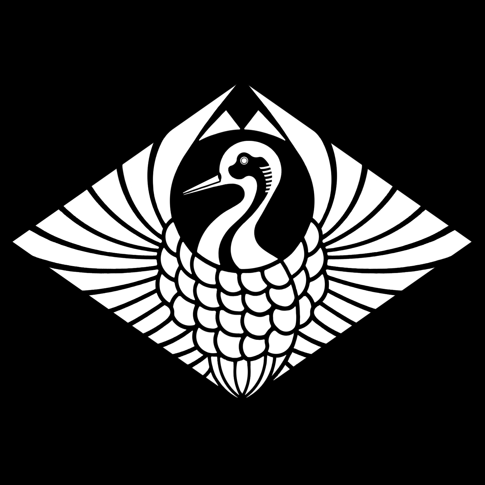 「鶴菱」紋（染抜）